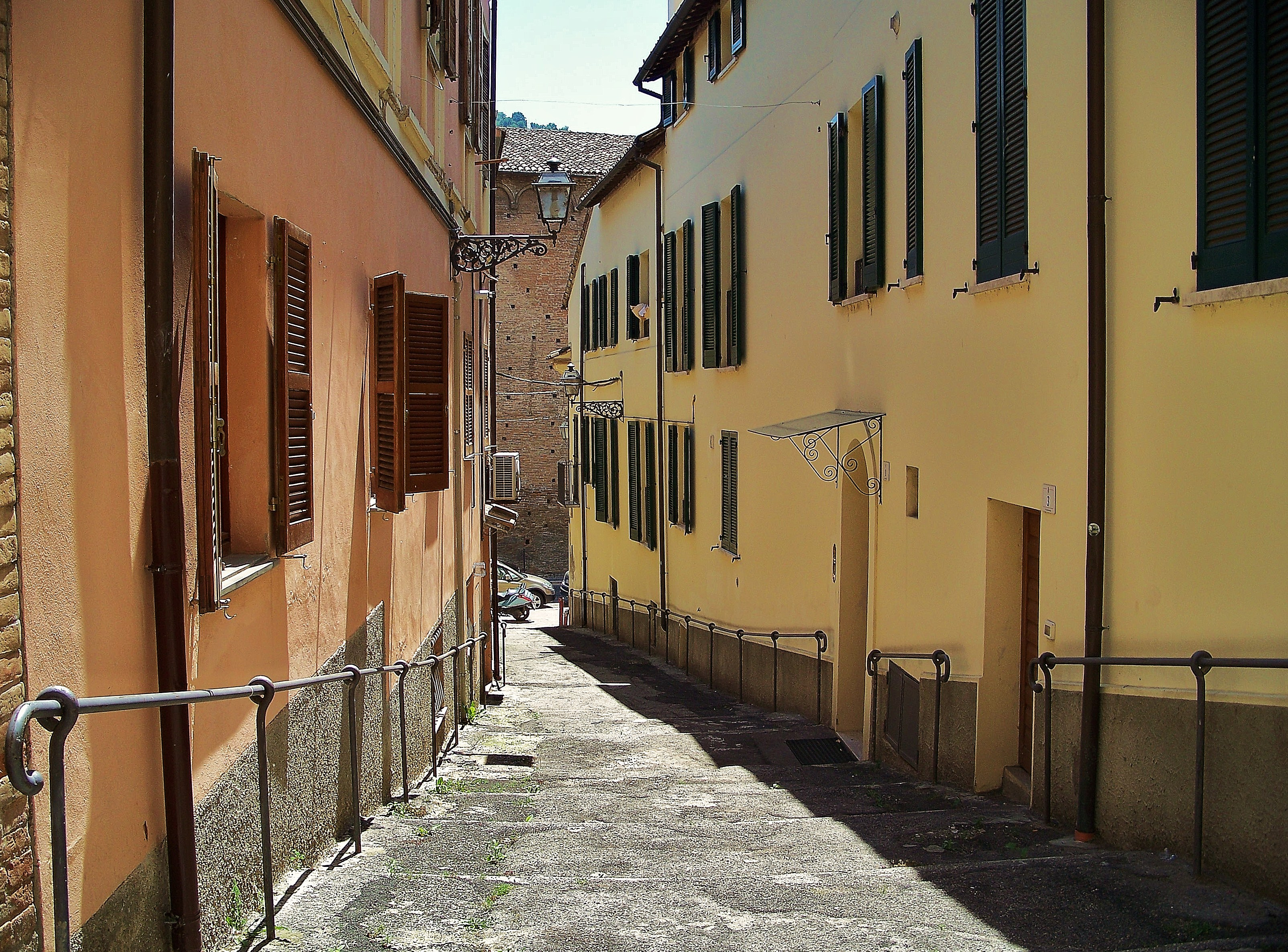 Via nel centro storico teramano, nei pressi di Corso Porta Romana